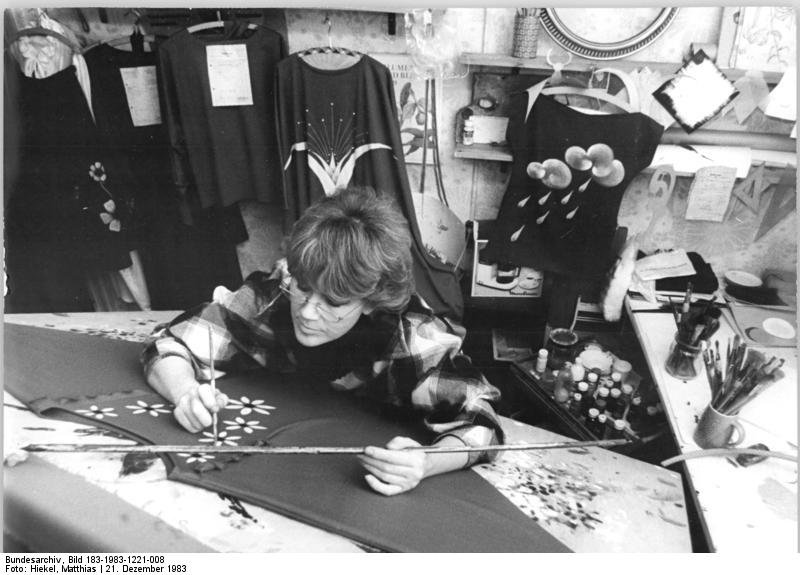 ADN-ZB-Hiekel-21.12.1983-schl-Dresden: Atelier-Phantasievoll bemalte Kleider, Röcke, Blusen und Anzüge entstehen im Atelier der Textilmalerin Renate Schröder. Nach individuellen Kundenwünschen zaubert die gelernte Schrift- und Reklamemalerin seit 20 Jahren die verschiedensten Dessins auf Georgette, Satin, Seidenjersey und andere pflegeleichte Stoffe. Die dabei verwendeten Farben sind natürlich waschfest. (siehe 7N)